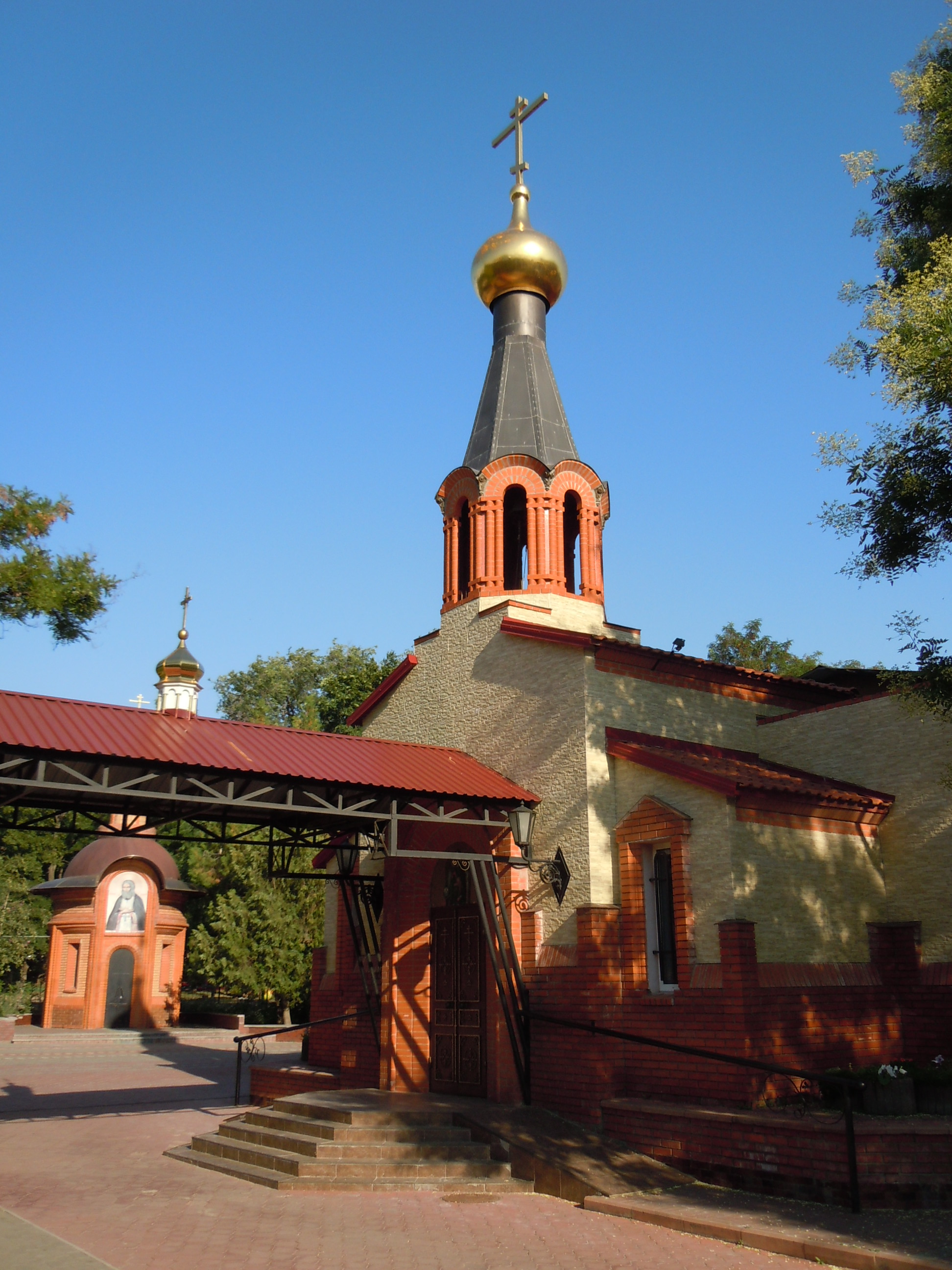 Михайлівська церква, Одеса